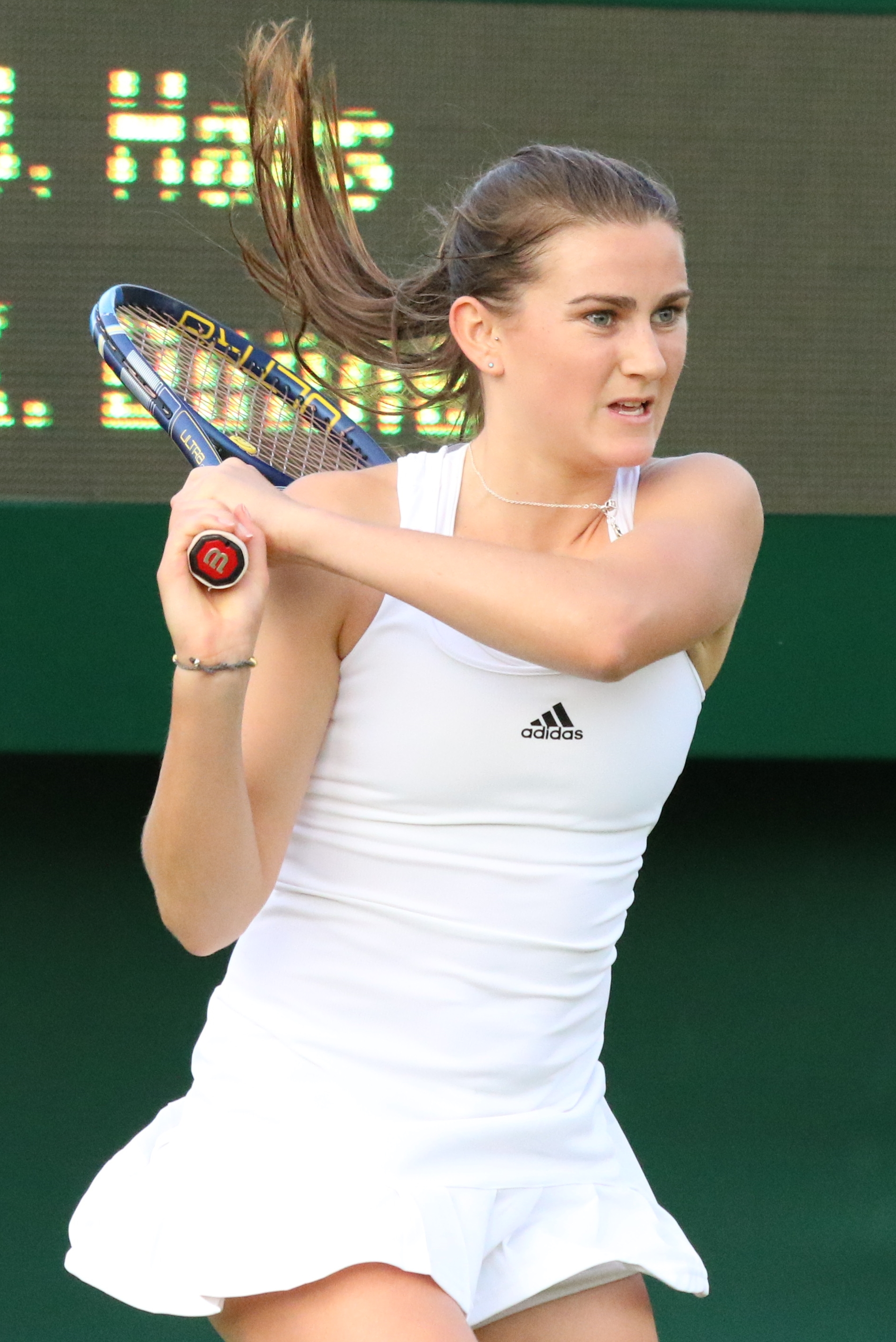 Dunne WMQ16 (10)